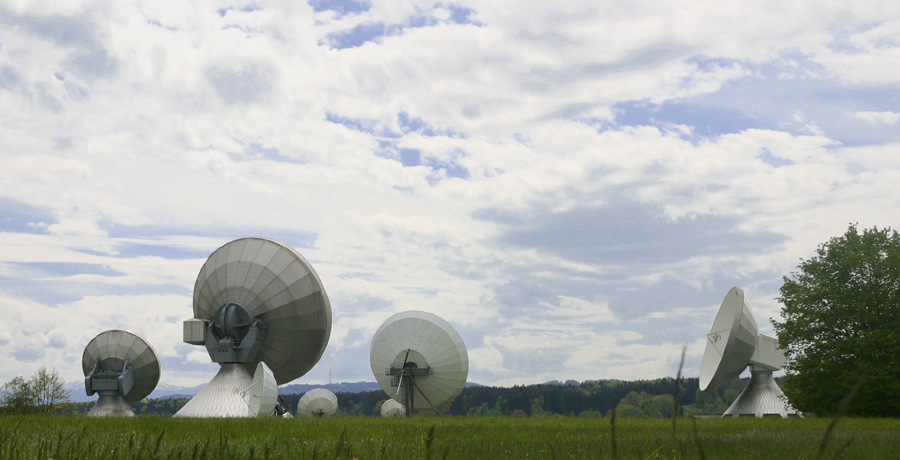 Parabolantennen der Erdfunkstelle in Reisting, Deutschland.